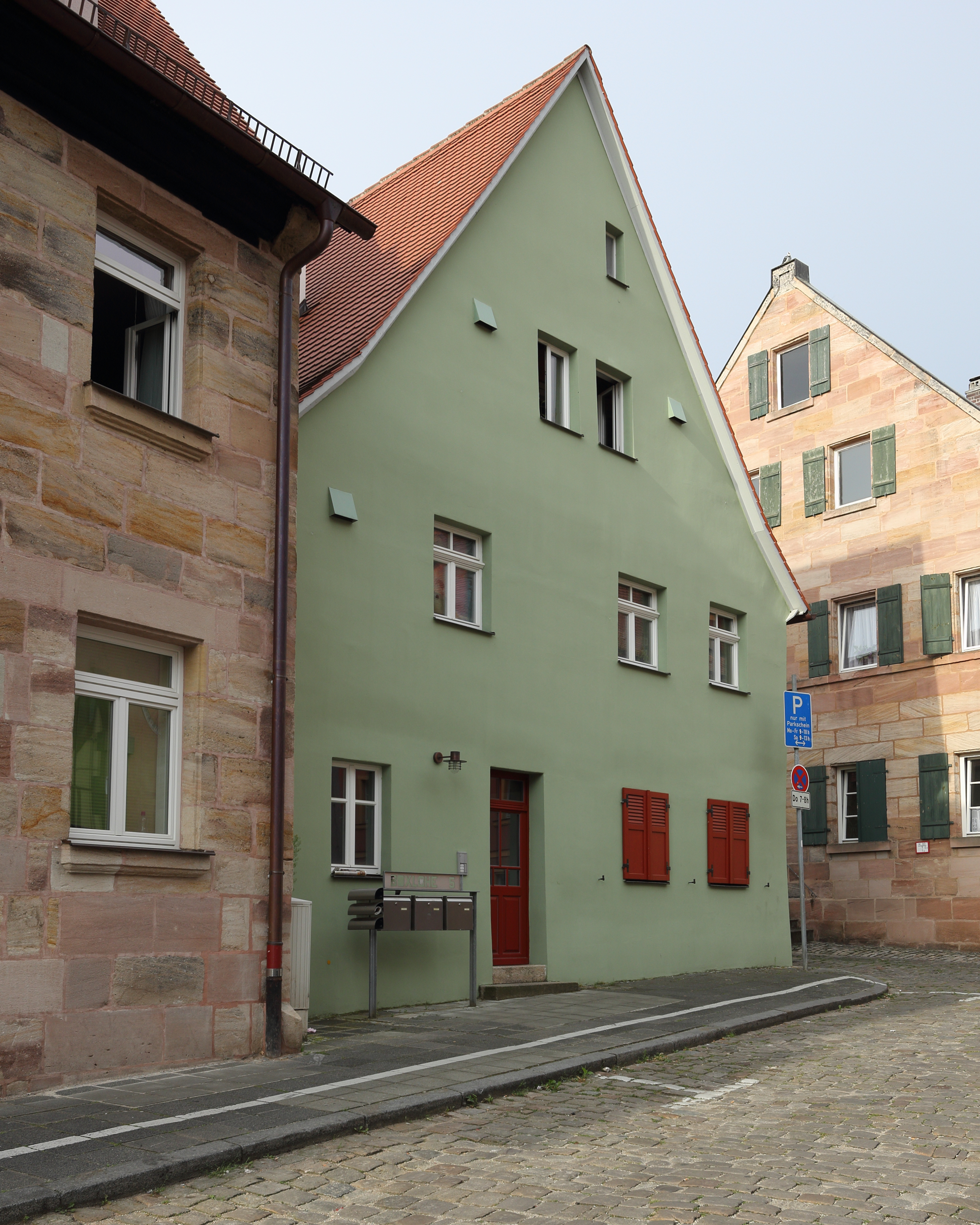 Schwabach - Boxlohe 5 - Wohnhaus. Zweigeschossiges, giebelständiges Eckhaus mit verputztem Sandsteinquadermauerwerk, Fachwerkobergeschoss und steilem Satteldach, im Kern mittelalterlich, Dachwerk von 1536 (dendro. dat.), 1821 nach Brand teilweise erneuert.